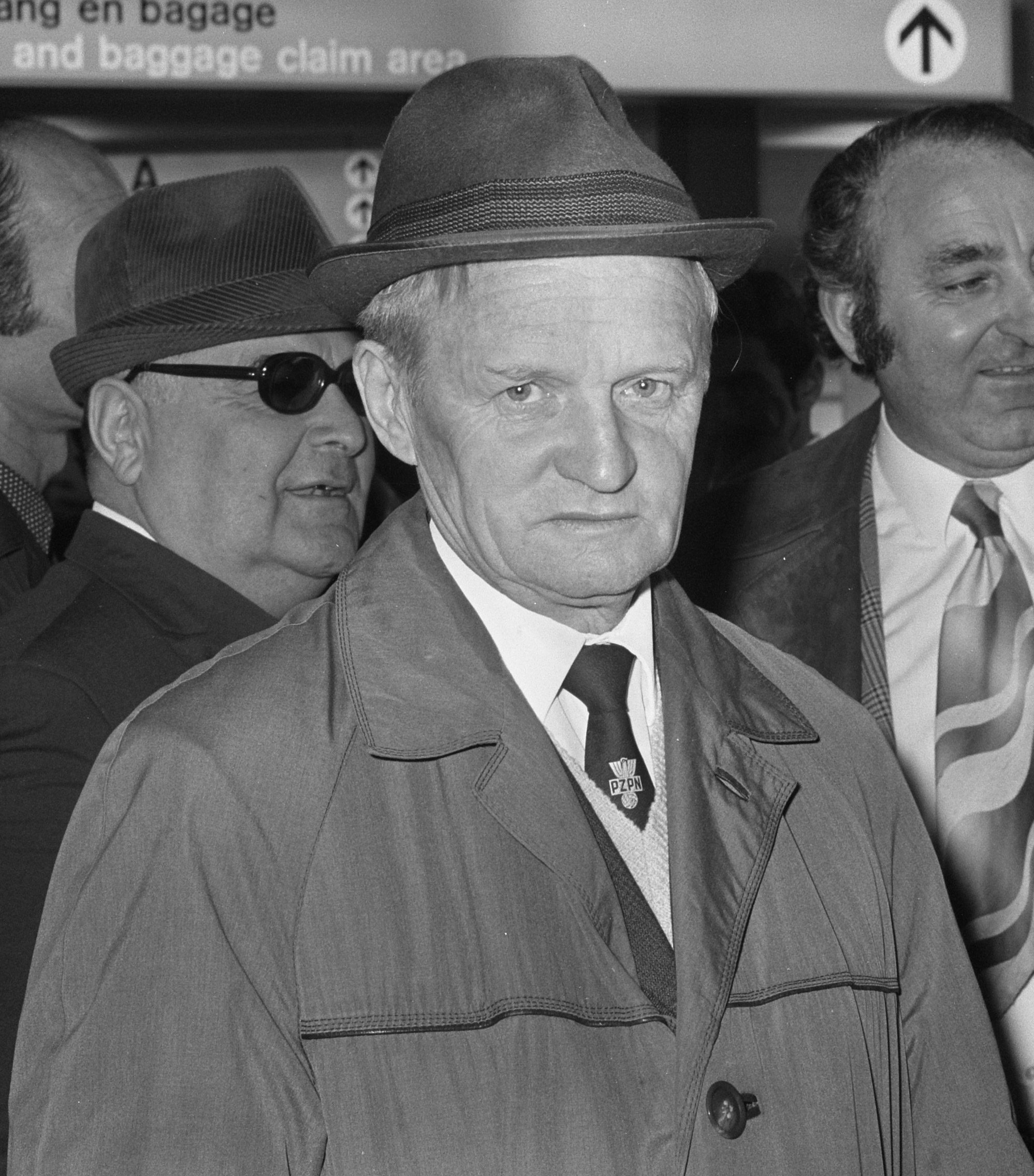 Elftal Dynamo Tbilisi op Schiphol, trainer Katchalin.